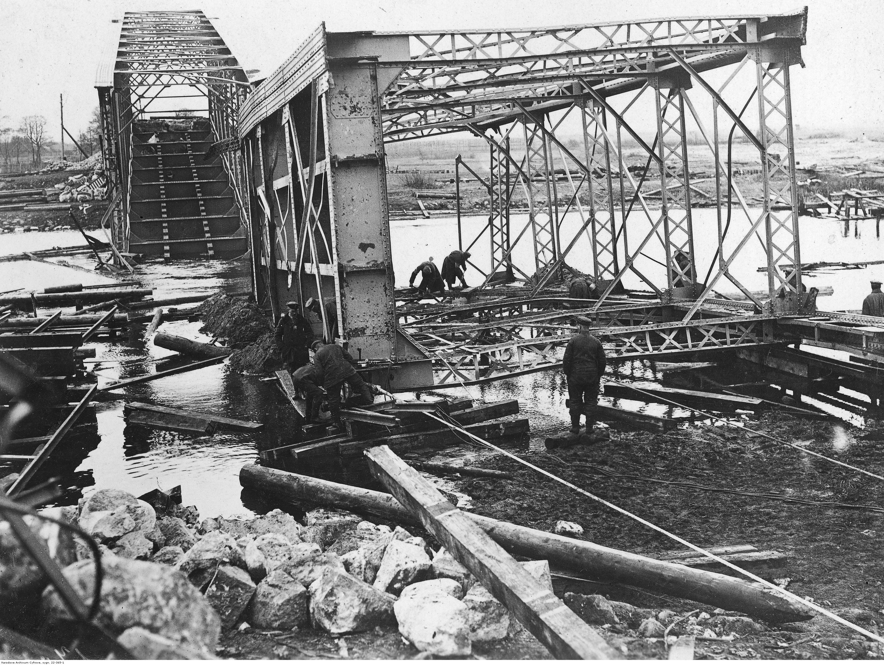 Nierozpoznany most w okolicach Kowna. Zniszczony prawdopodobnie w trakcie I wojny światowej.